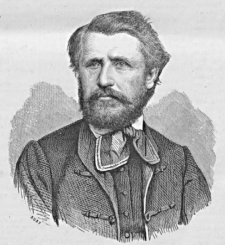 Zichy Antal (1823–1898) író, politikus. Rusz Károly metszete (Vasárnapi Ujság, 1871. január 8.)